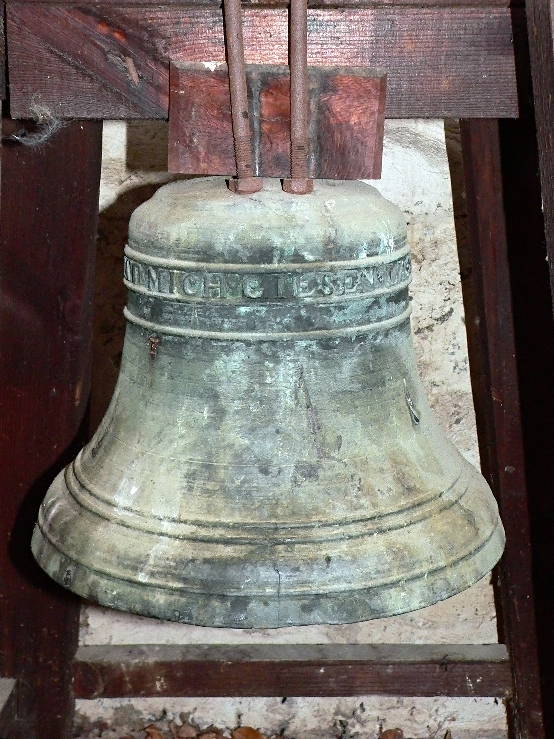 Glocke des Höchster Schlosses